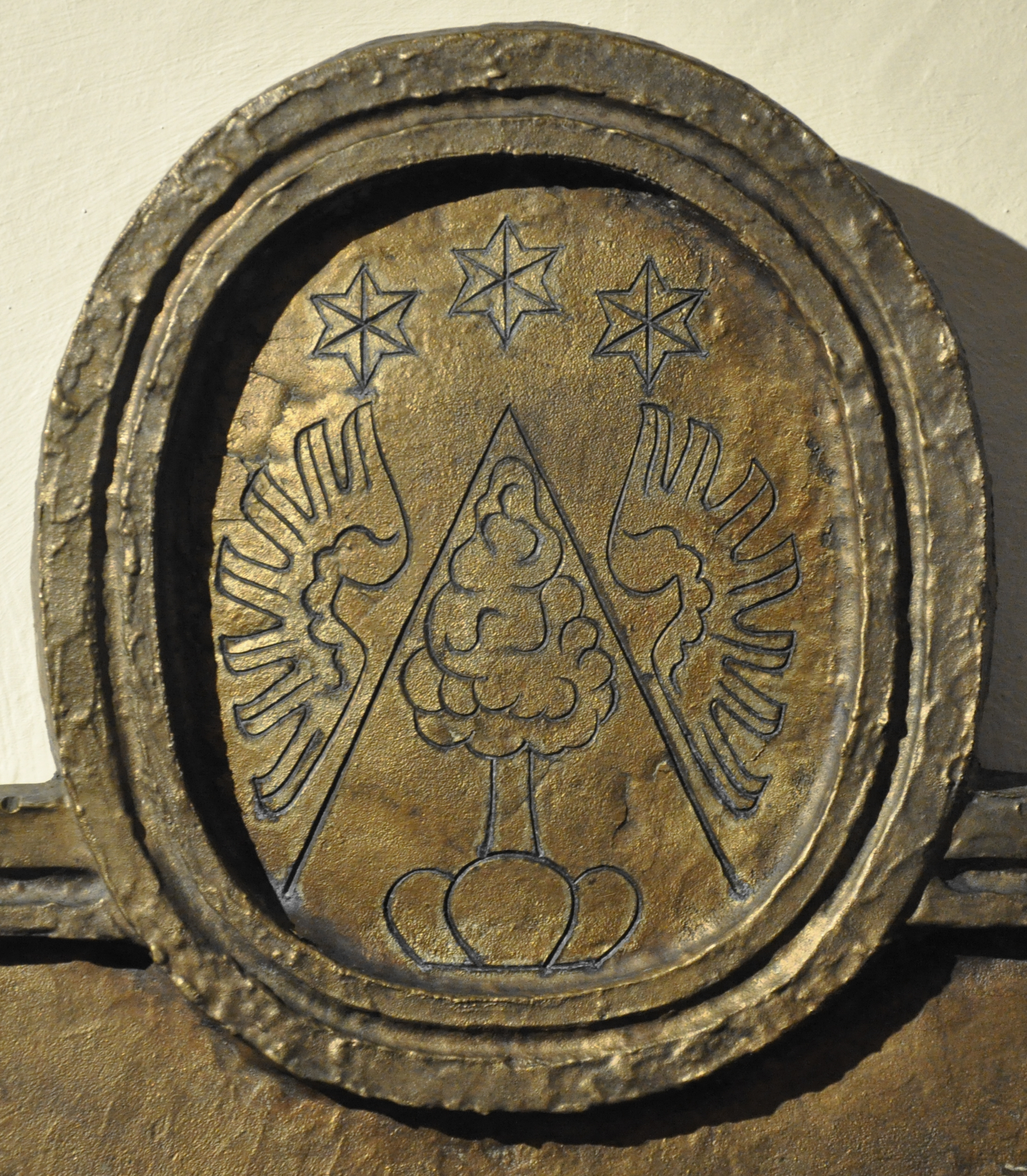 St. Gallen, Stiftskirche, Ostkrypta, Grab des Abts Beda Angehrn, Abtswappen